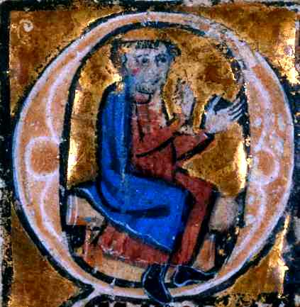 Initiale einer lateinischen Handschrift von De febribus (Kitāb al-ḥummayāt) des Isaak ben Salomon Israeli, die vermutlich den Autor darstellen soll. Harvard, Medical School, Countway Library of Medicine, Ballard 31, Südfrankreich, Montpellier (?) (Mitte 13. Jh.)